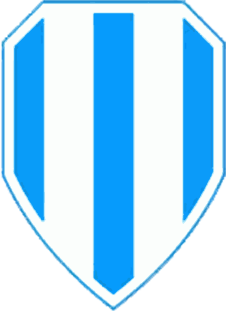 Escudo del Club Ferrocarril Roca de Las Flores Buenos Aires Argentina